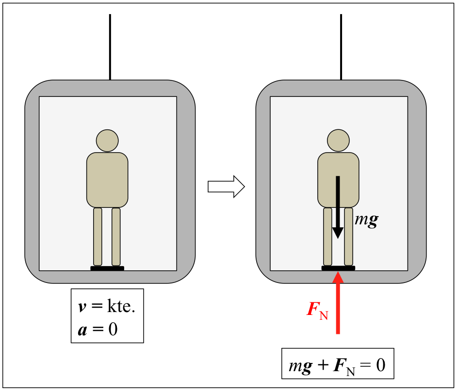 Igogailua geldi dagoela guregorputzak jarasten dituen indarren eskema.